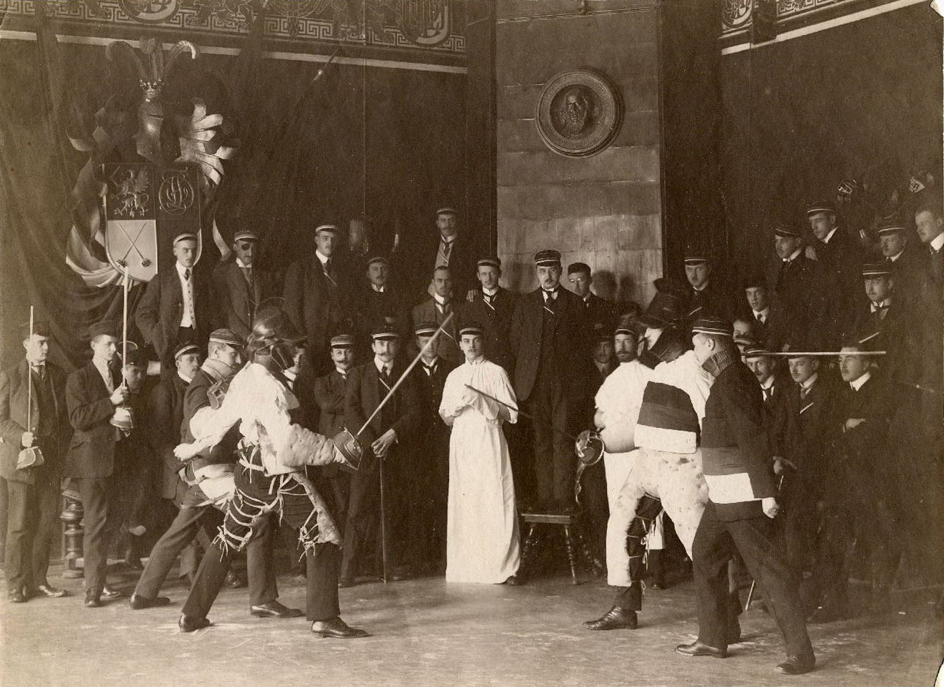 Livonia mensuur